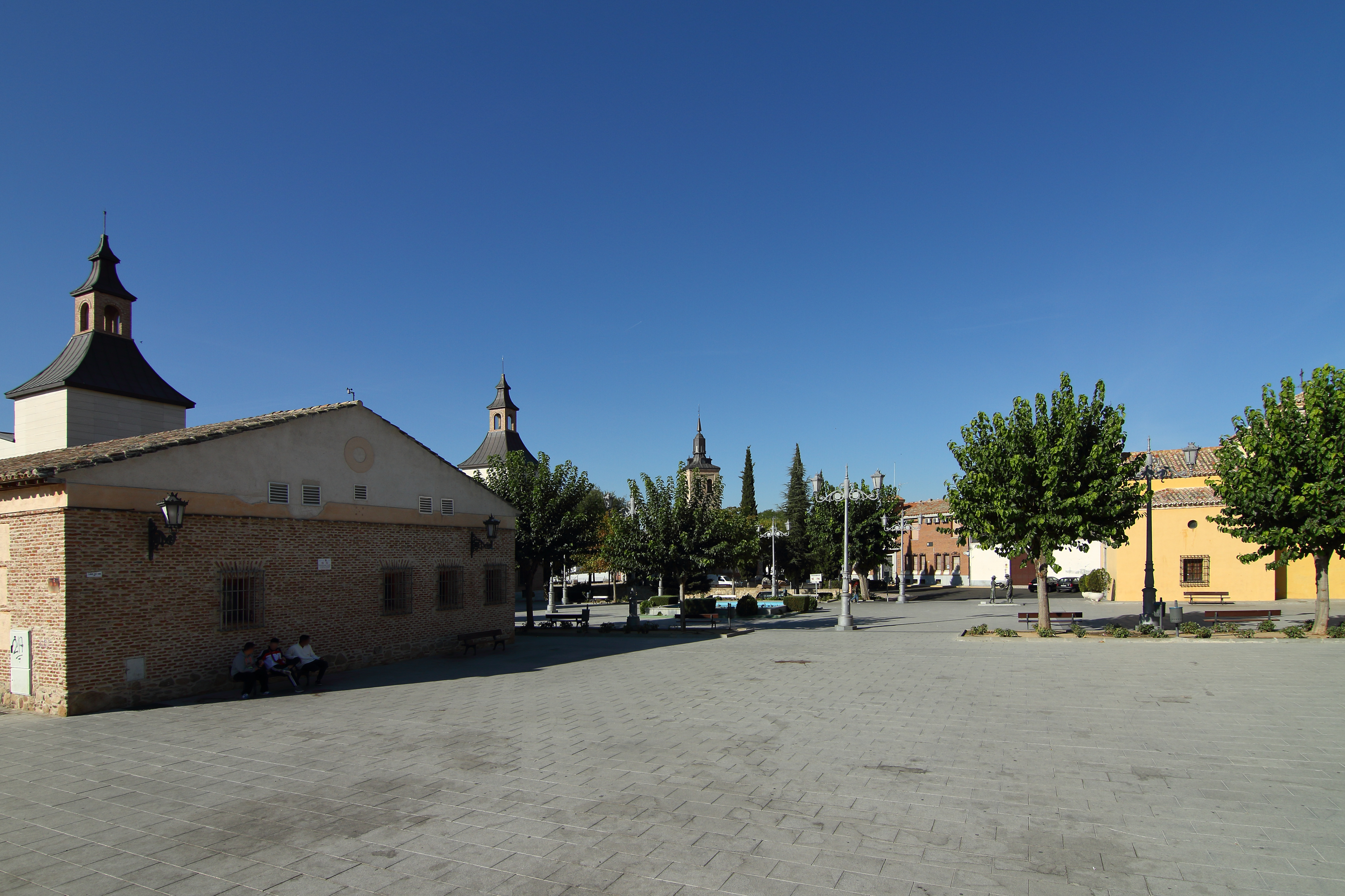 Ugena, plaza del ayuntamiento